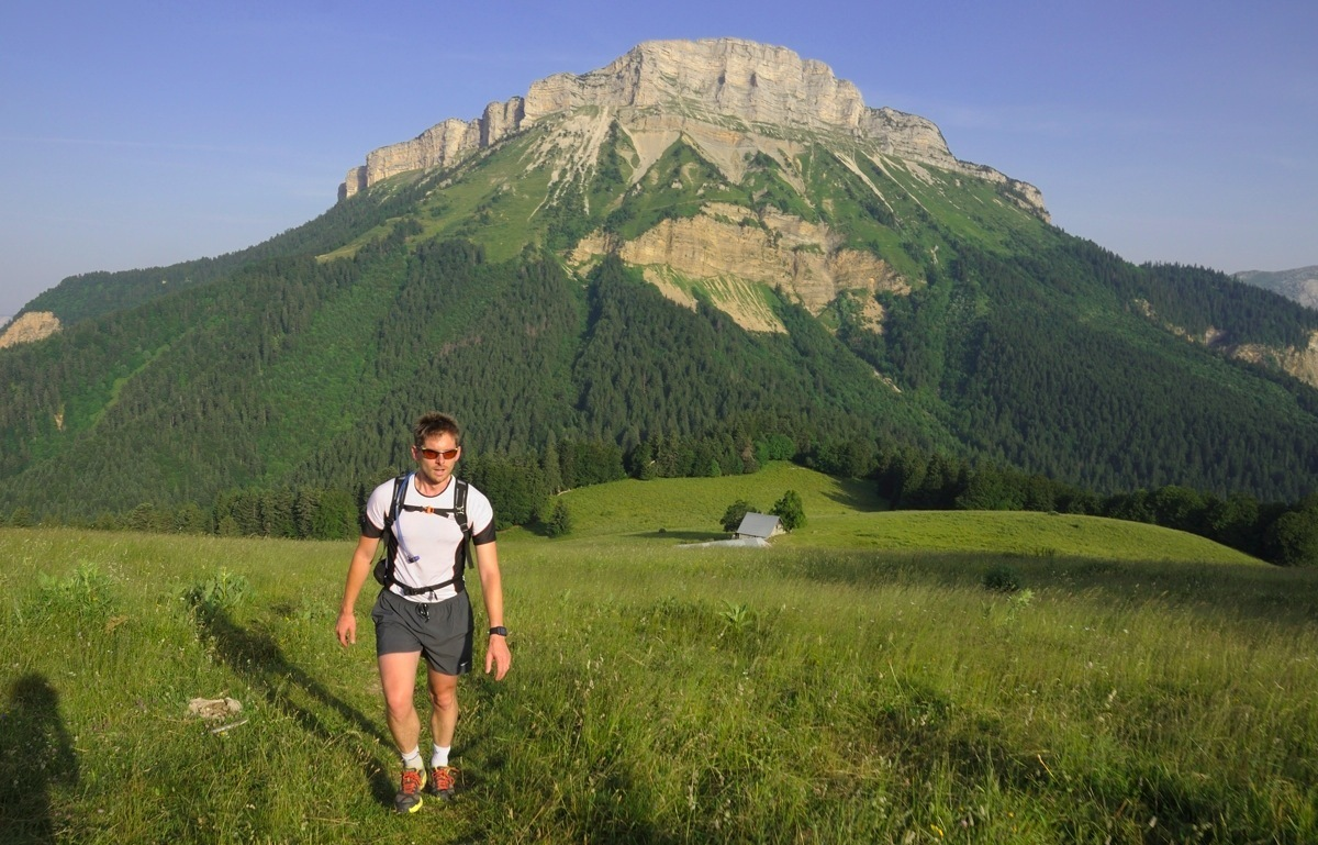 GR9, Traversée de Chartreuse : Grenoble-Chambéry